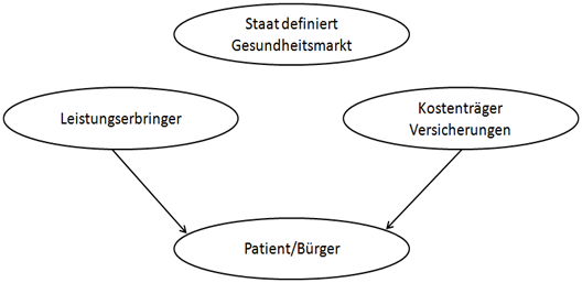 Das Privatversicherungsmodell